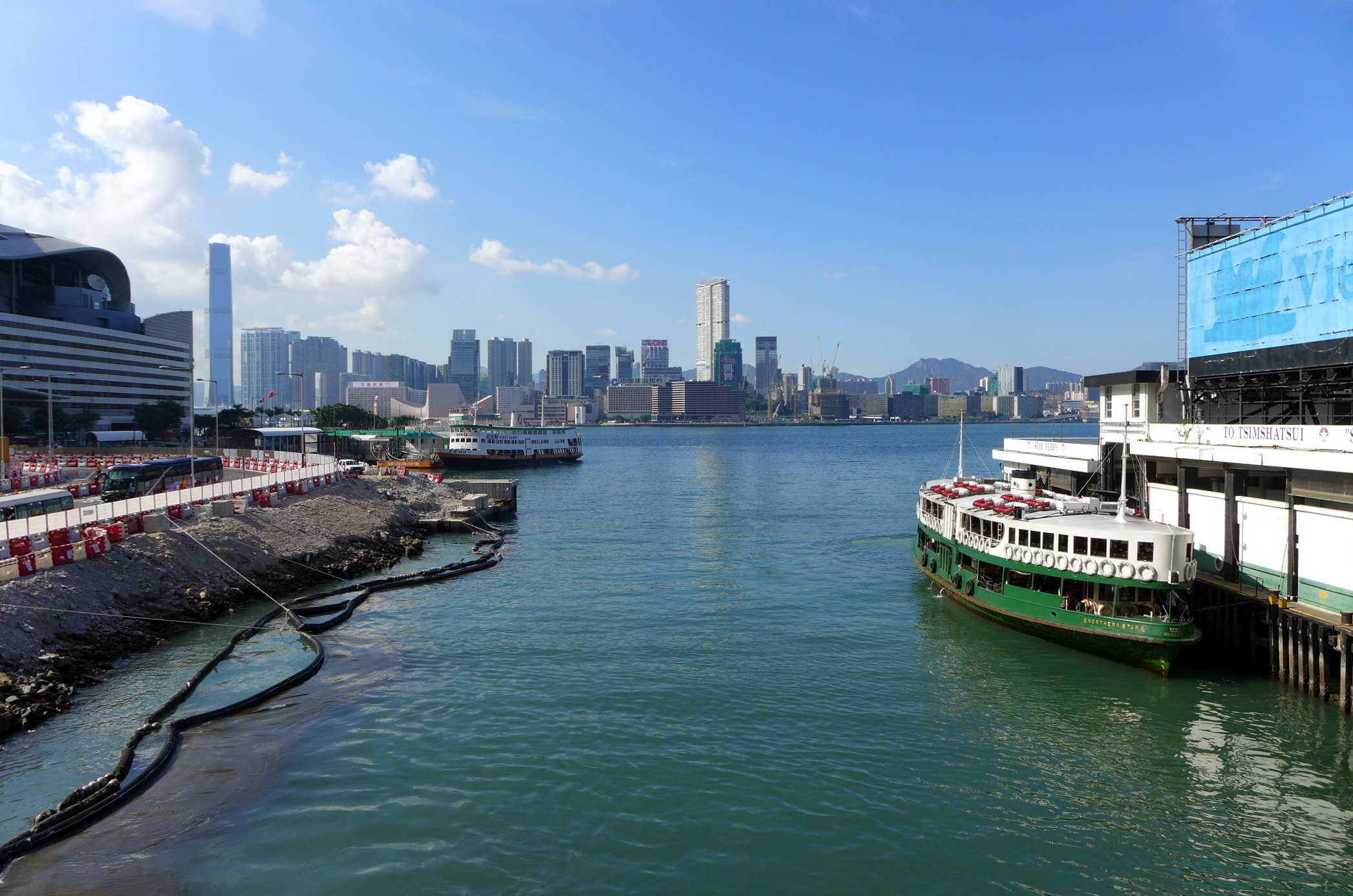 Wan Chai Pier